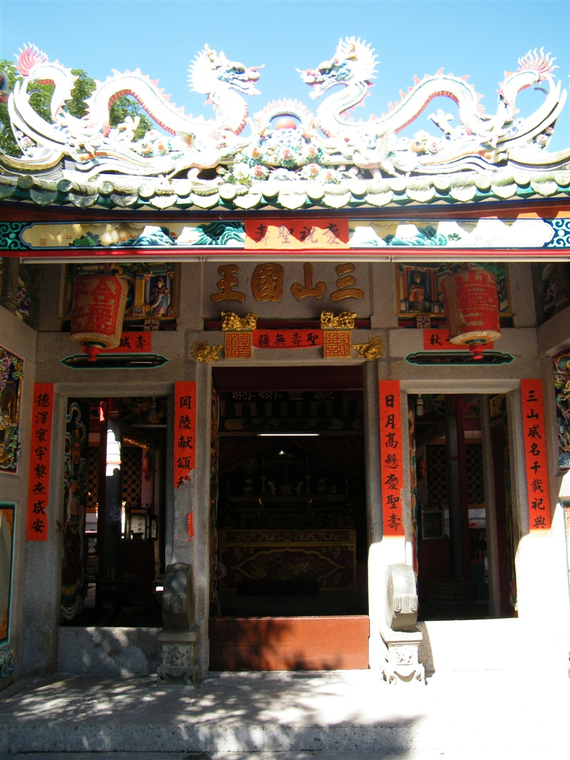 达濠王爷宫三山国王